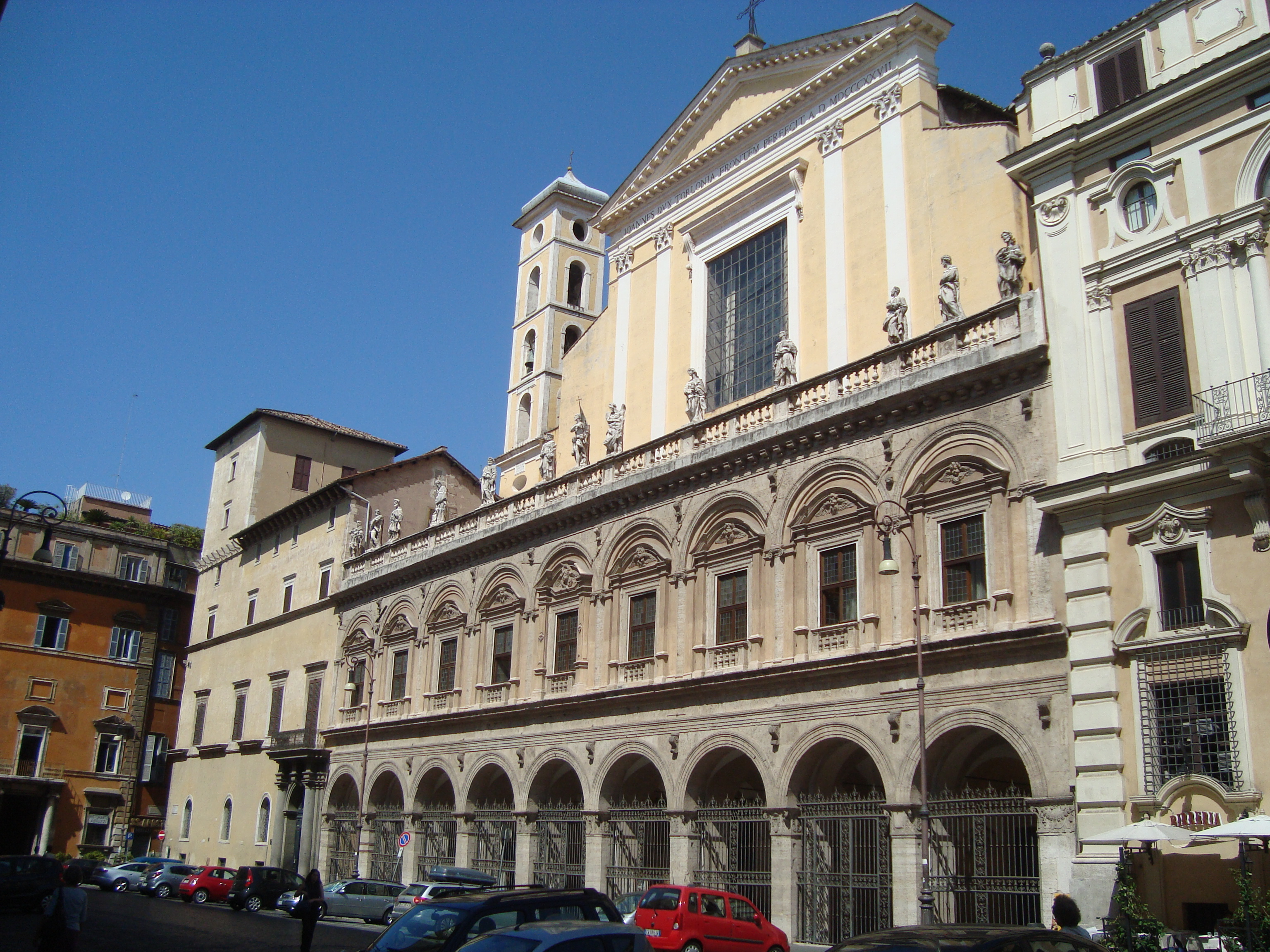 Basilique des Saints-Apotres à Rome